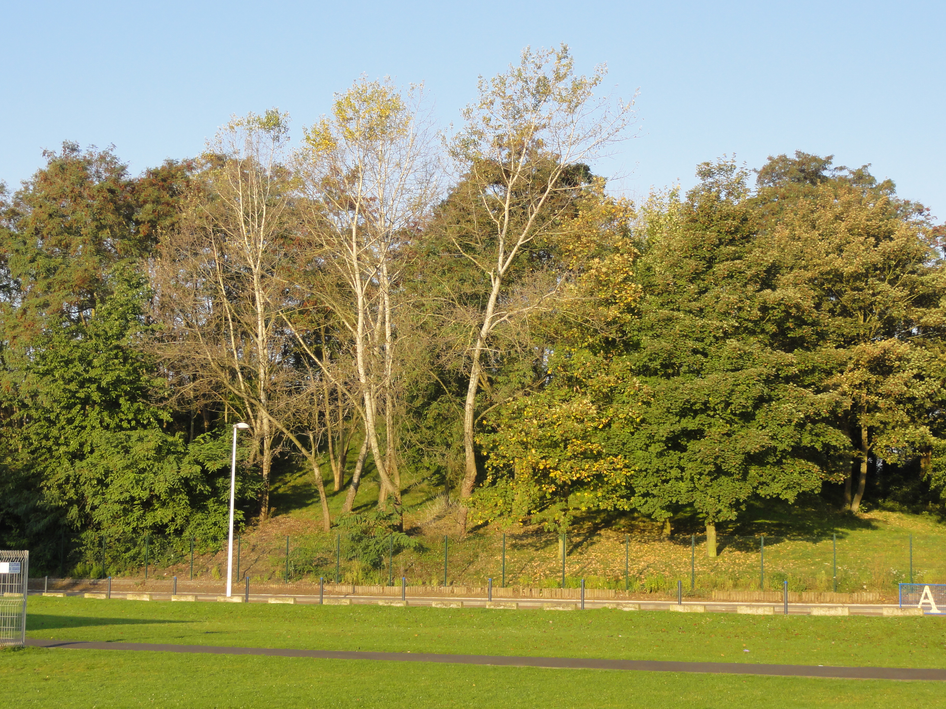 Terril n° 114 dit 13 d'Oignies Ouest, Fosse n° 3 de la Compagnie des mines de Carvin, Carvin, Pas-de-Calais, Nord-Pas-de-Calais, France.